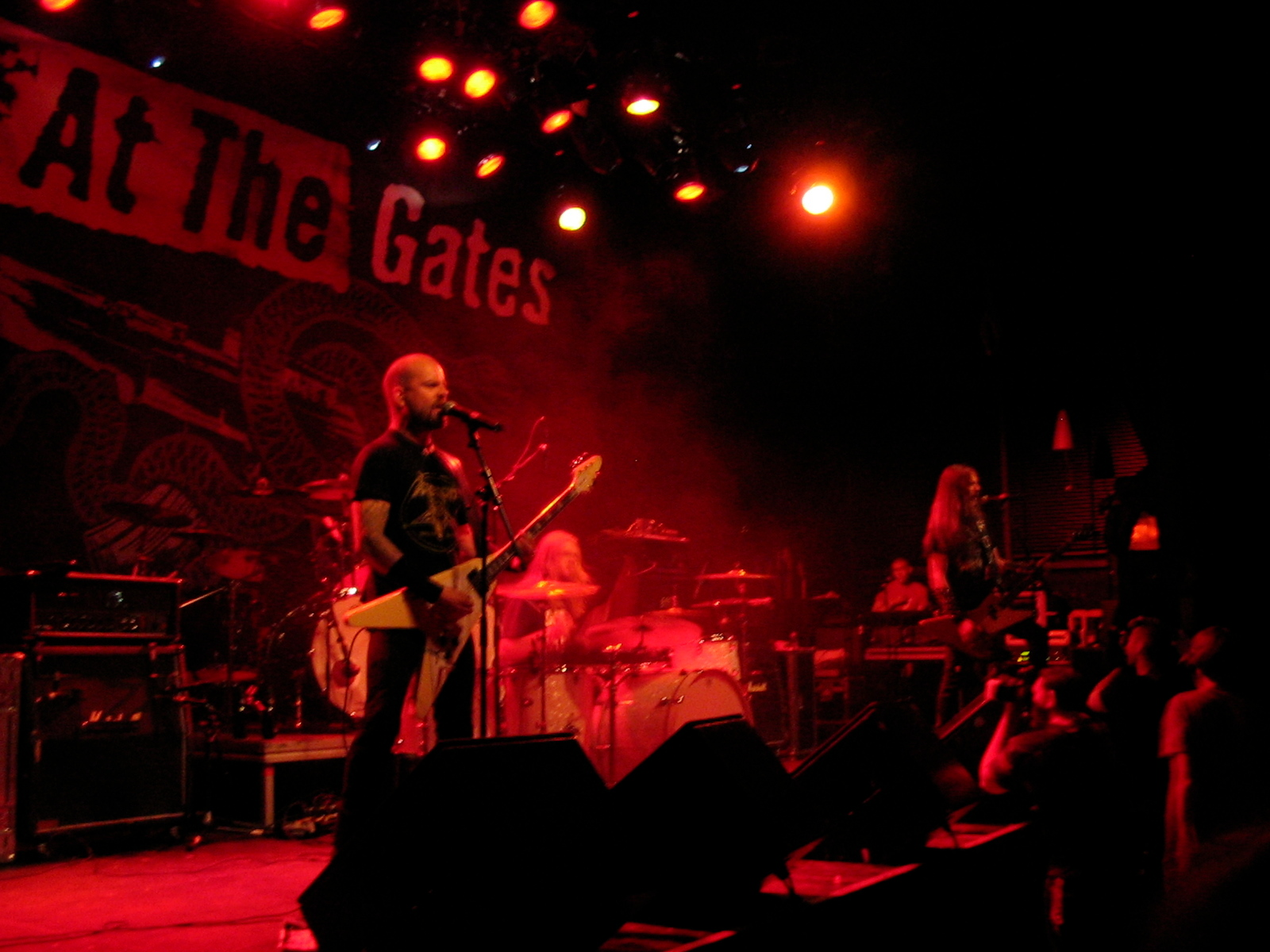 Grand Magus en Gotemborgo (Suecia) en 2008 como teloneros de At the Gates